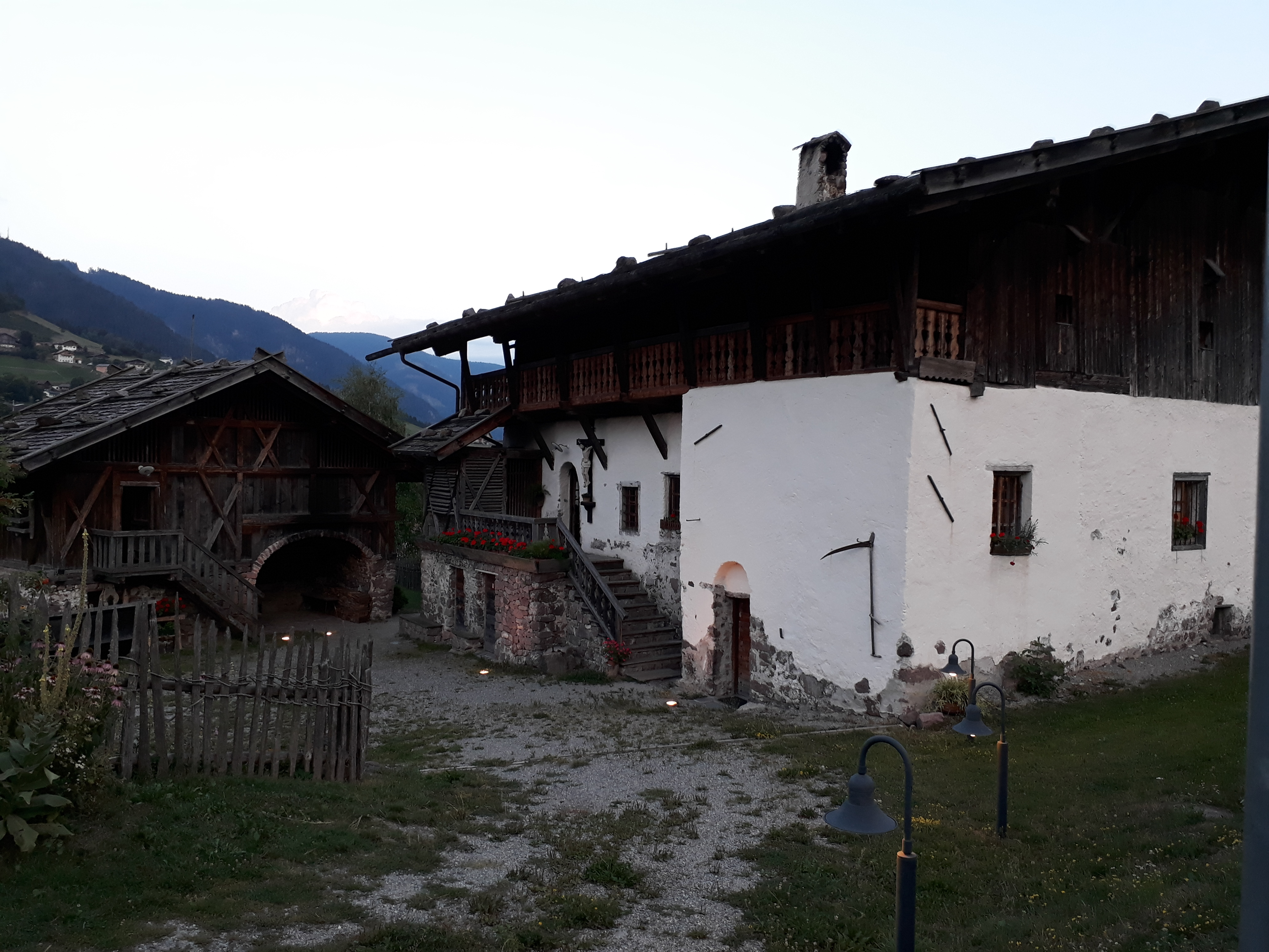 Das bäuerliche Rohrerhaus in Sarnthein.